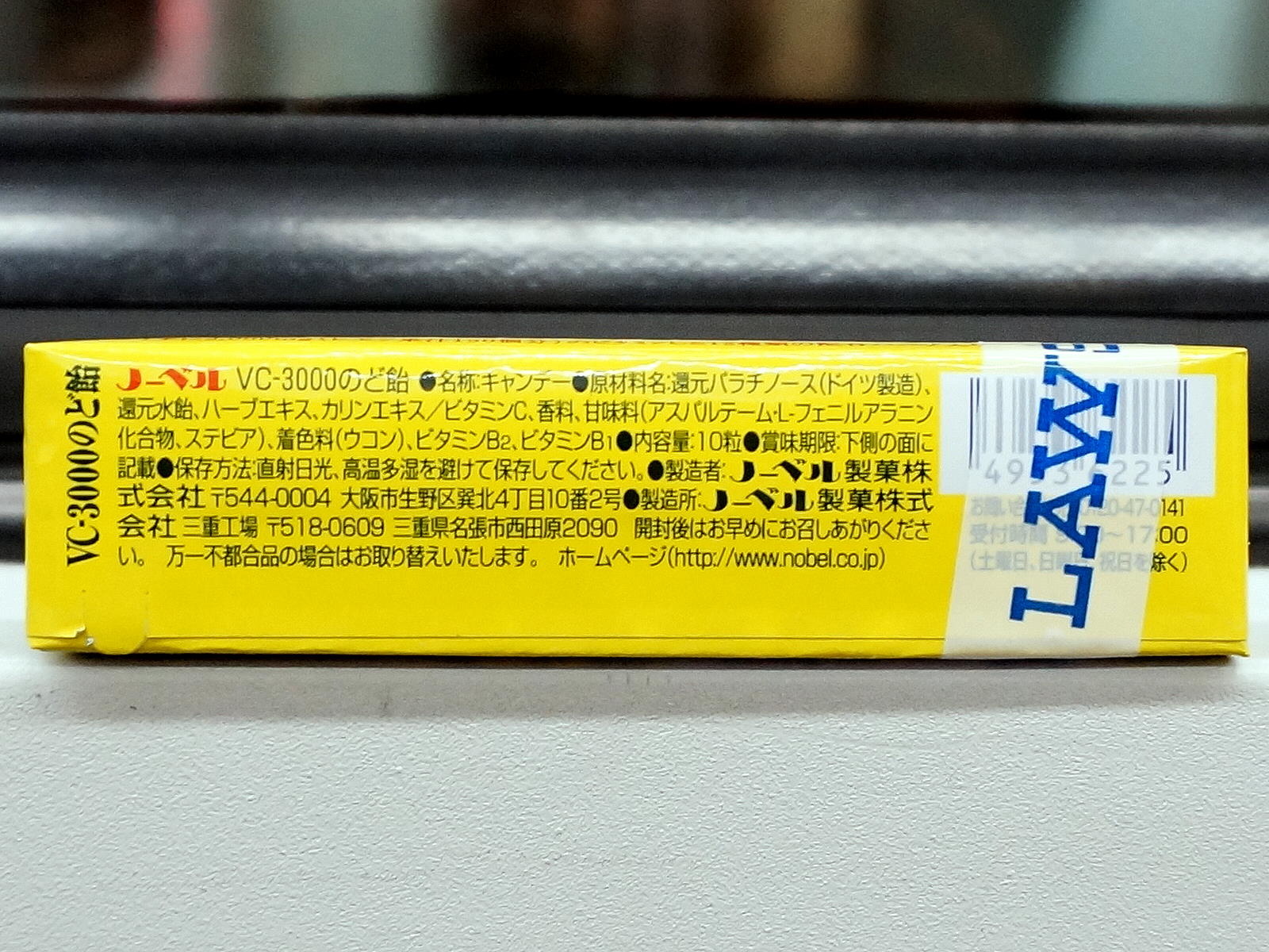 羅森便利商店售出的諾貝爾製菓VC-3000喉糖。